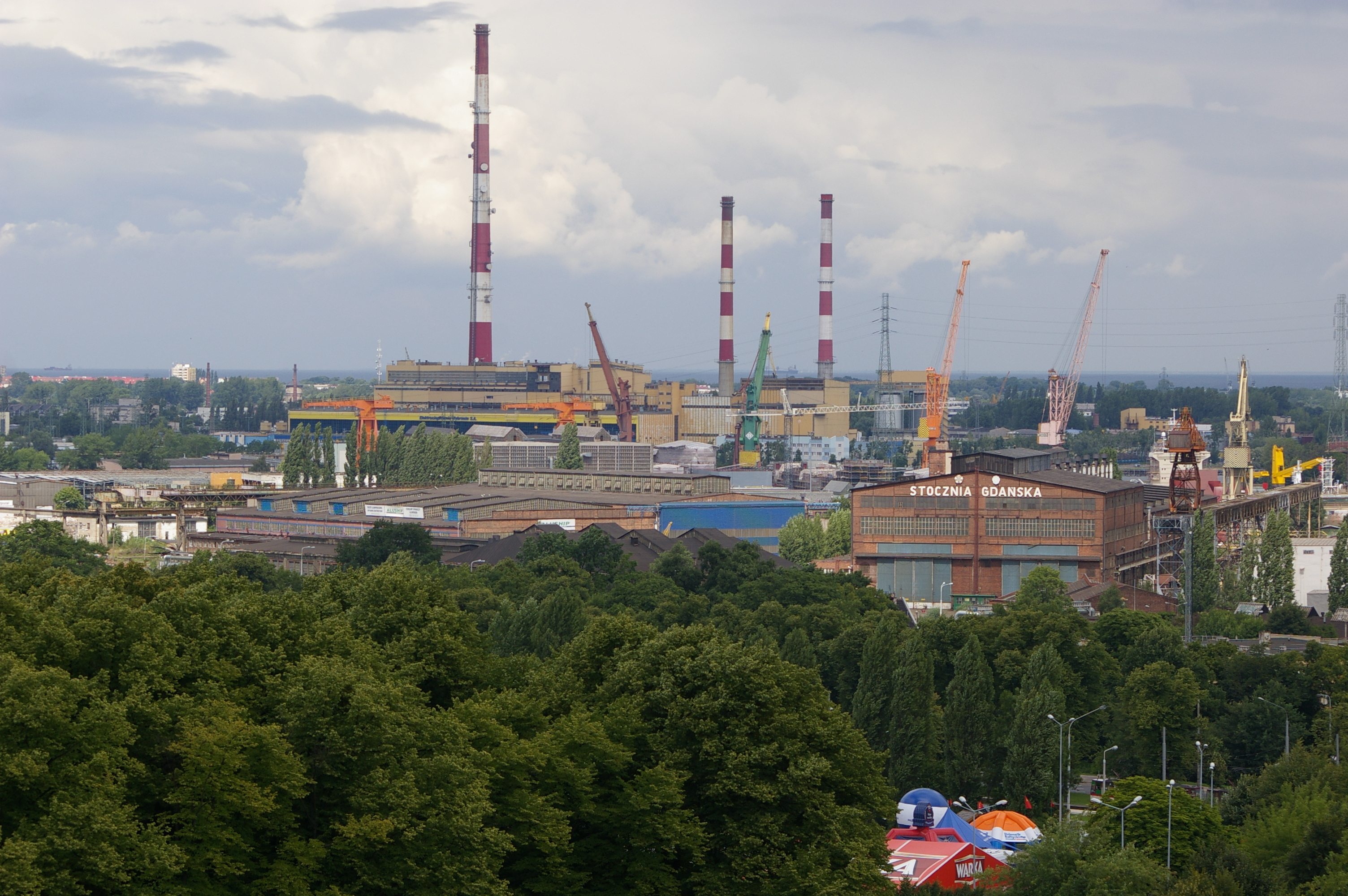 Gdańsk widziany z Góry Gradowej